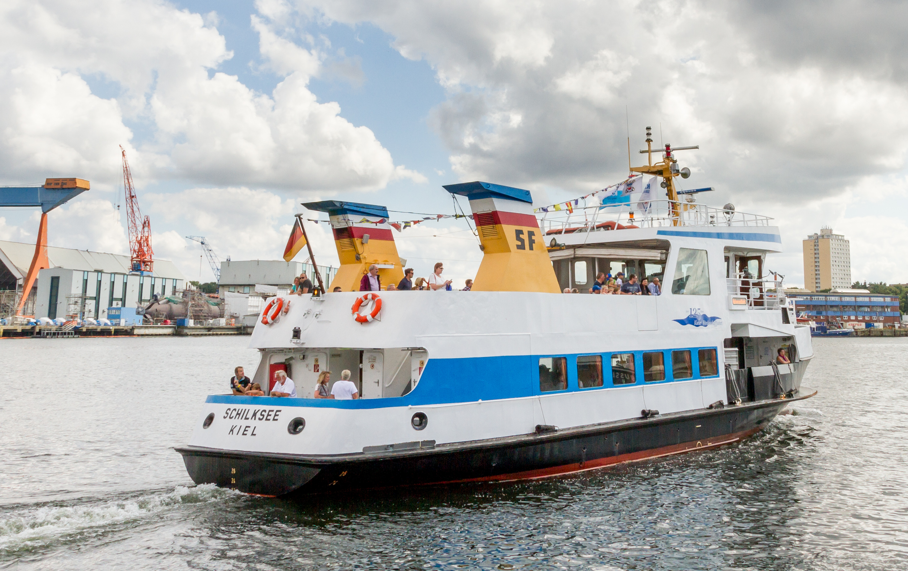 Fähre Schilksee